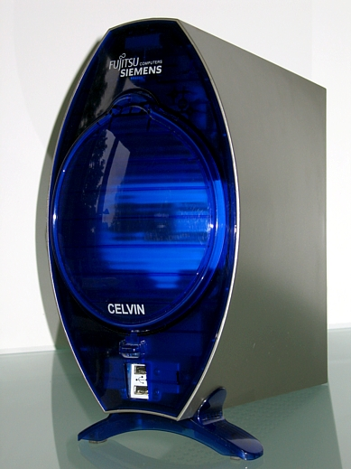 FujitsuSiemens Celvin